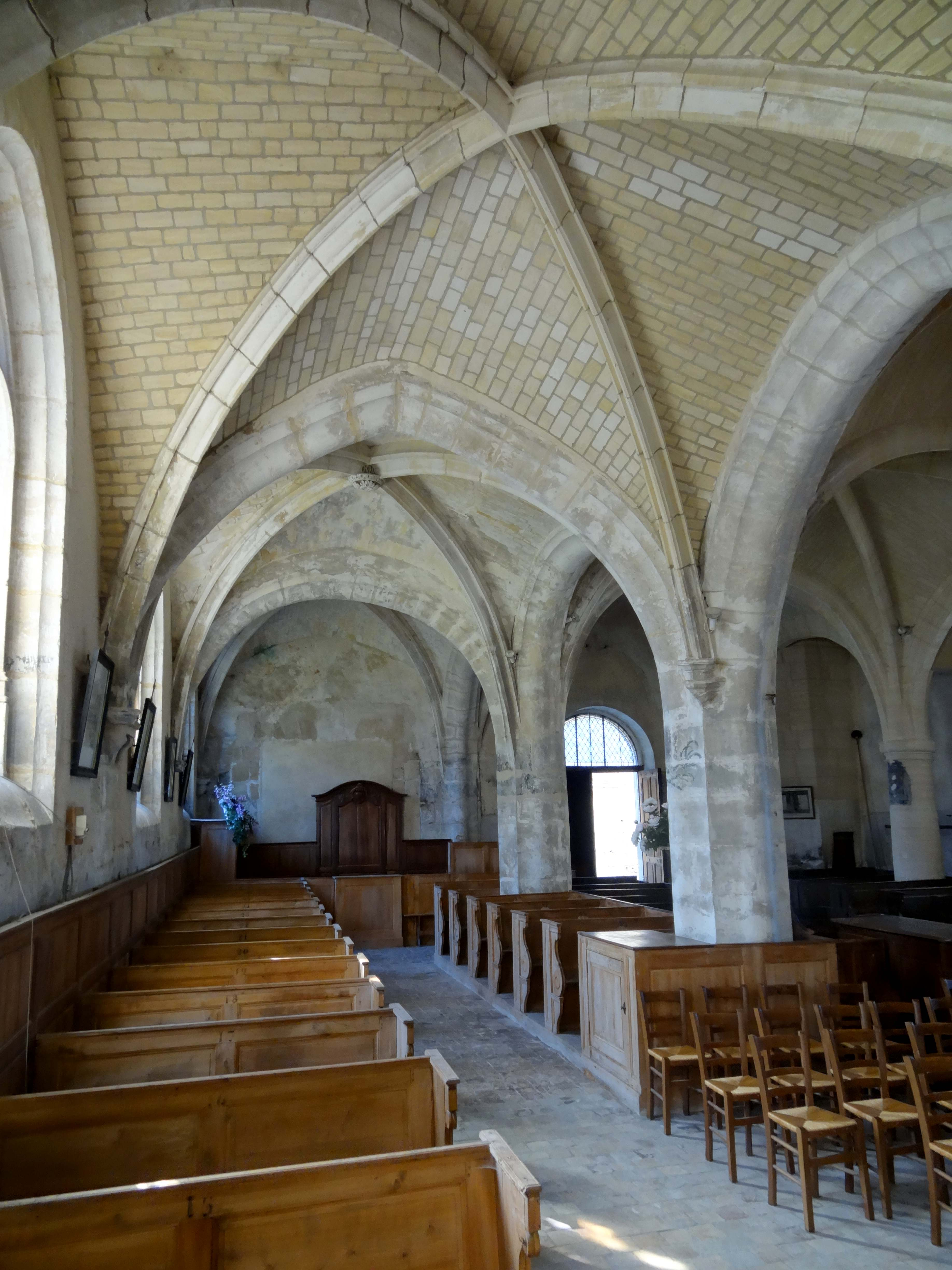 Intérieur de l'église - voir titre.